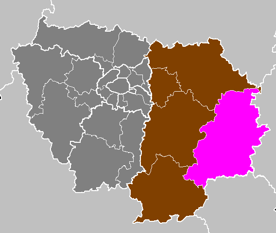 Maps of arrondissements and cantons of France: Département de Seine-et-Marne - Arrondissement de Provins.PNG (Région Île-de-France)